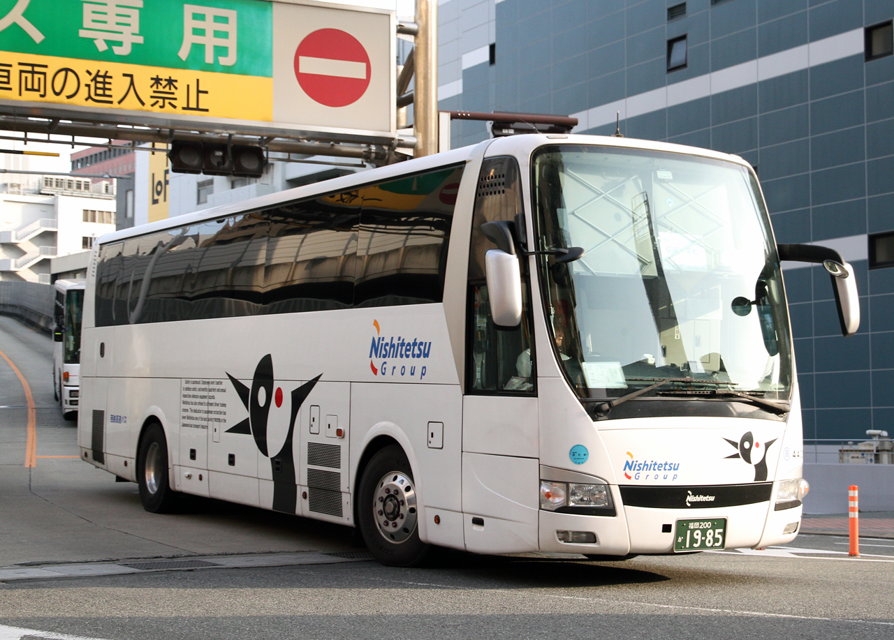 登録番号 福岡200か19-85 社番：4403 西鉄高速バス㈱福岡支社所属（乗務は北九州支社） 夜行高速路線用車両 2015年4月18日 福岡市中央区にて撮影 撮影者 Zondag2000